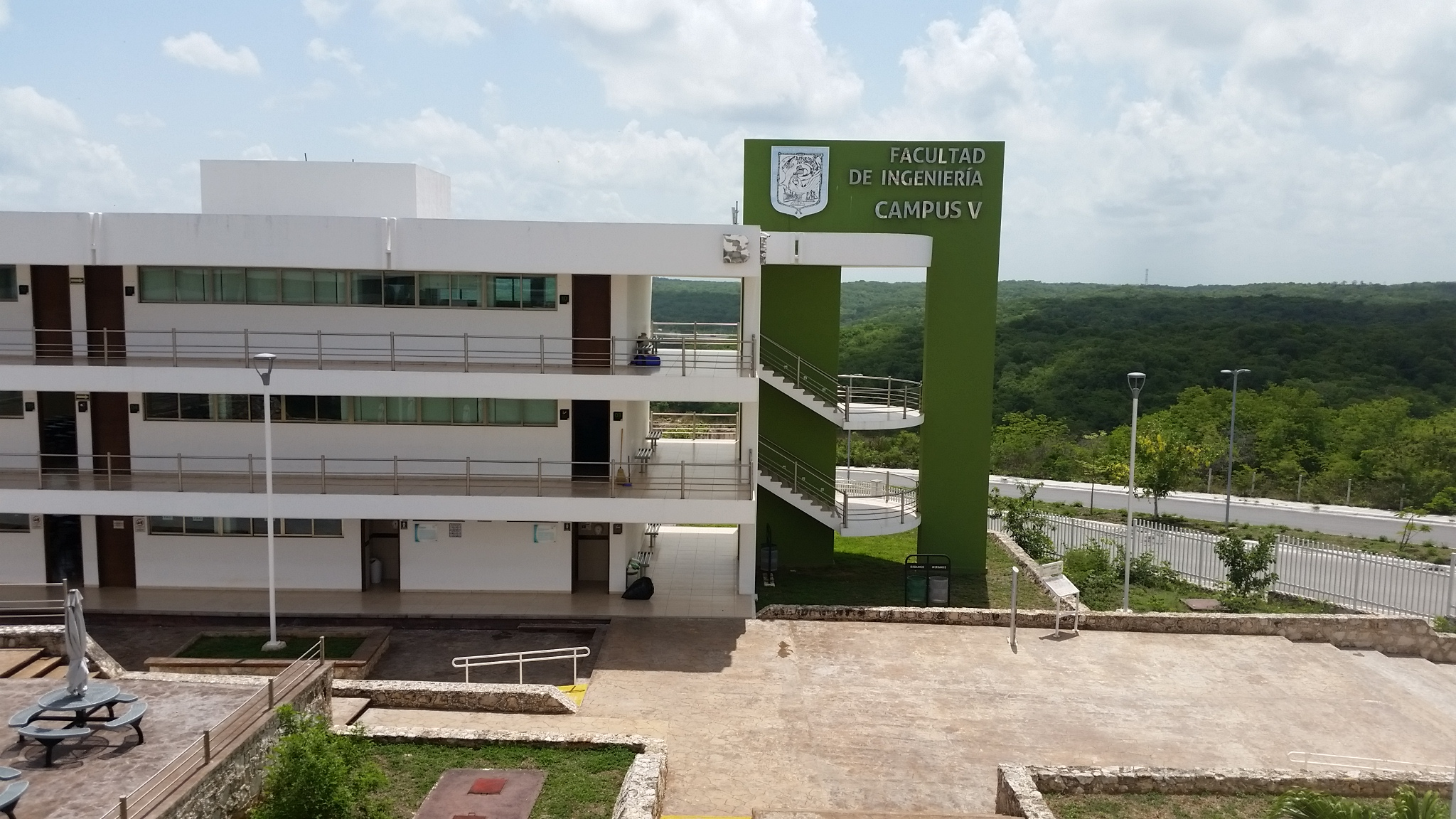 campus